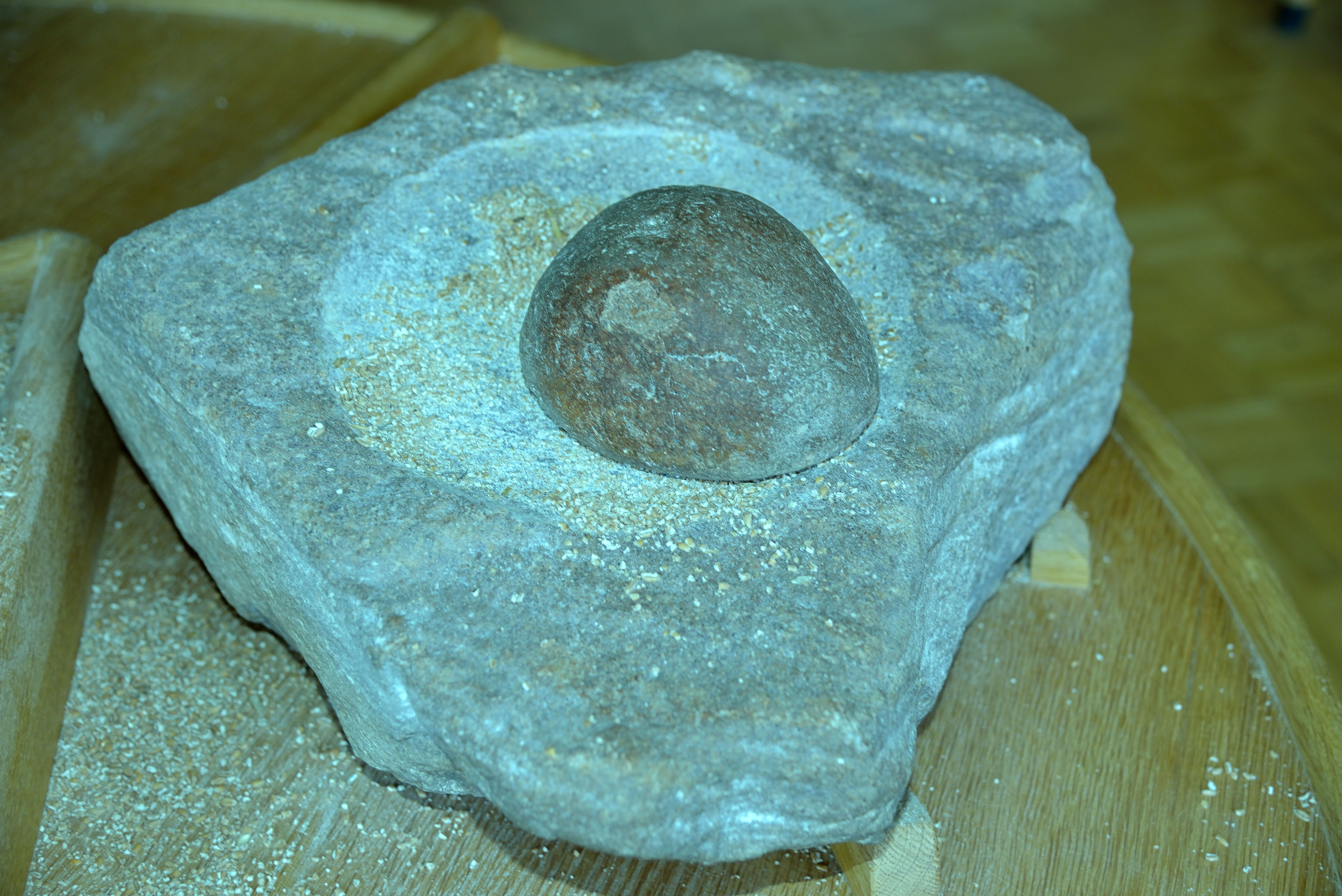 Mühlenverein im Kreis Minden-Lübbecke, Mühlenbauhof Petershagen-Frille, wooden